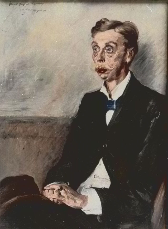 Bildnis Eduard Graf von Keyserling